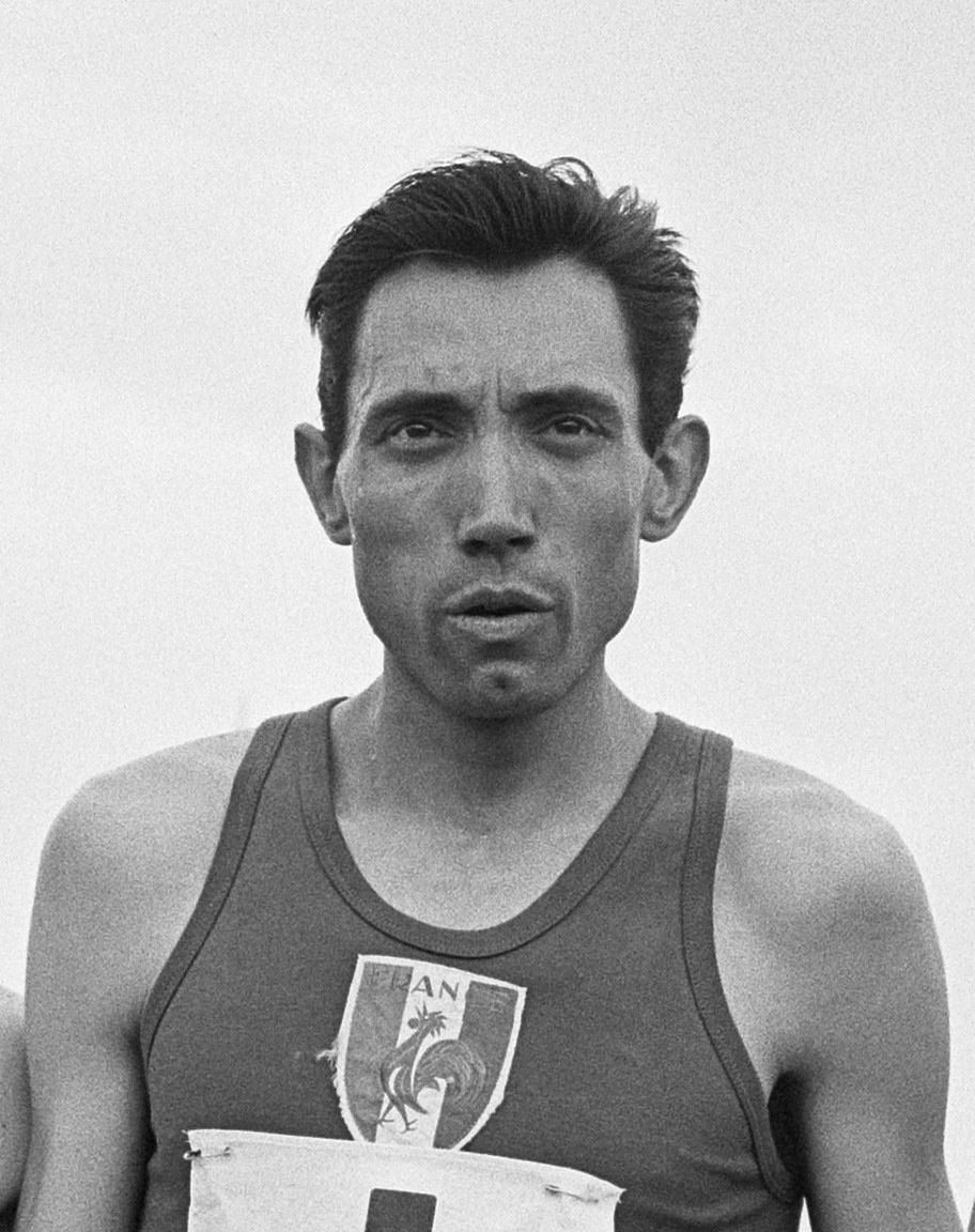 Lopers 1500 meter?: Wolfgang Fricke (Duitsland), Michel Bernard (Frankrijk), Roelants ? (België) )